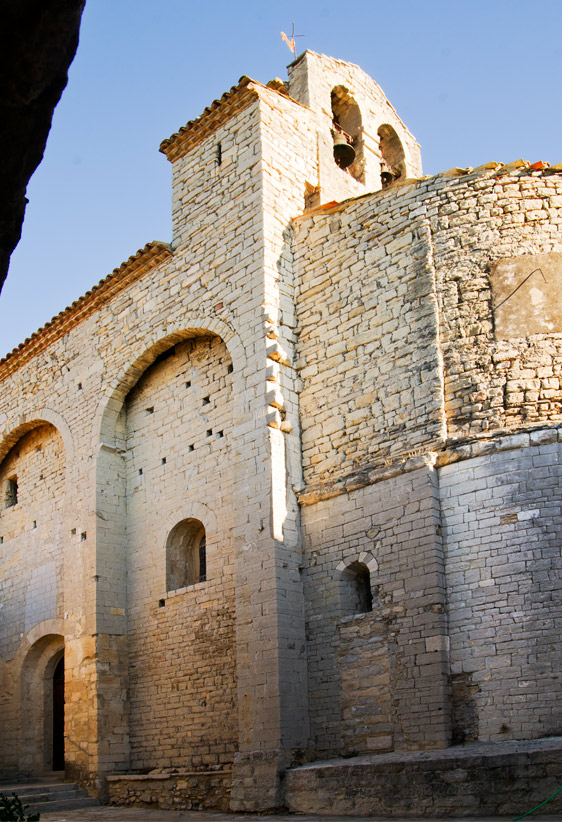 Église de la Nativité-de-Saint-Jean-Baptiste de Saint-Jean-de-Cuculles, (Inscrit, 1925) .